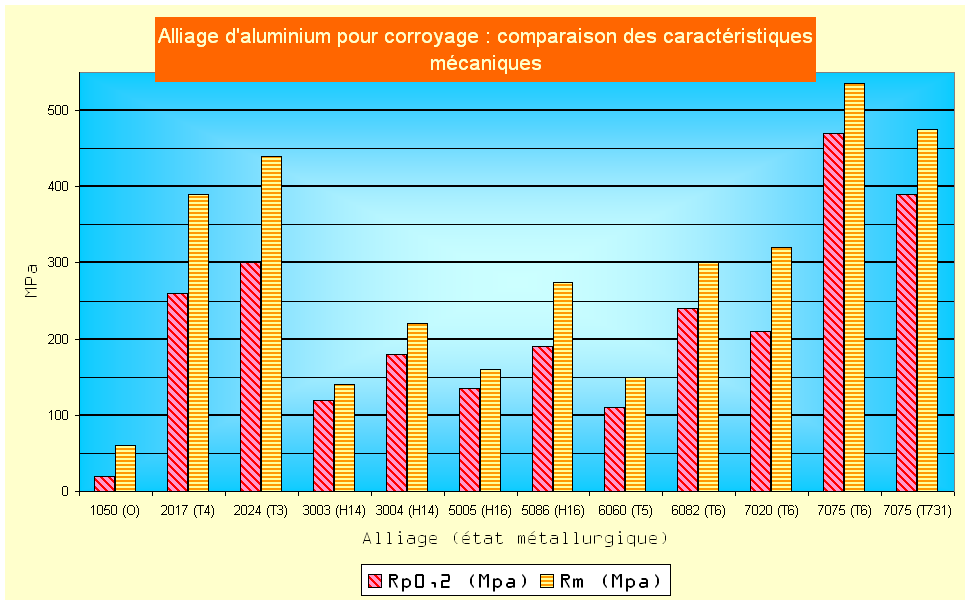 Comparaison des caractéristiques mécaniques das alliages d'aluminium pour corroyage.